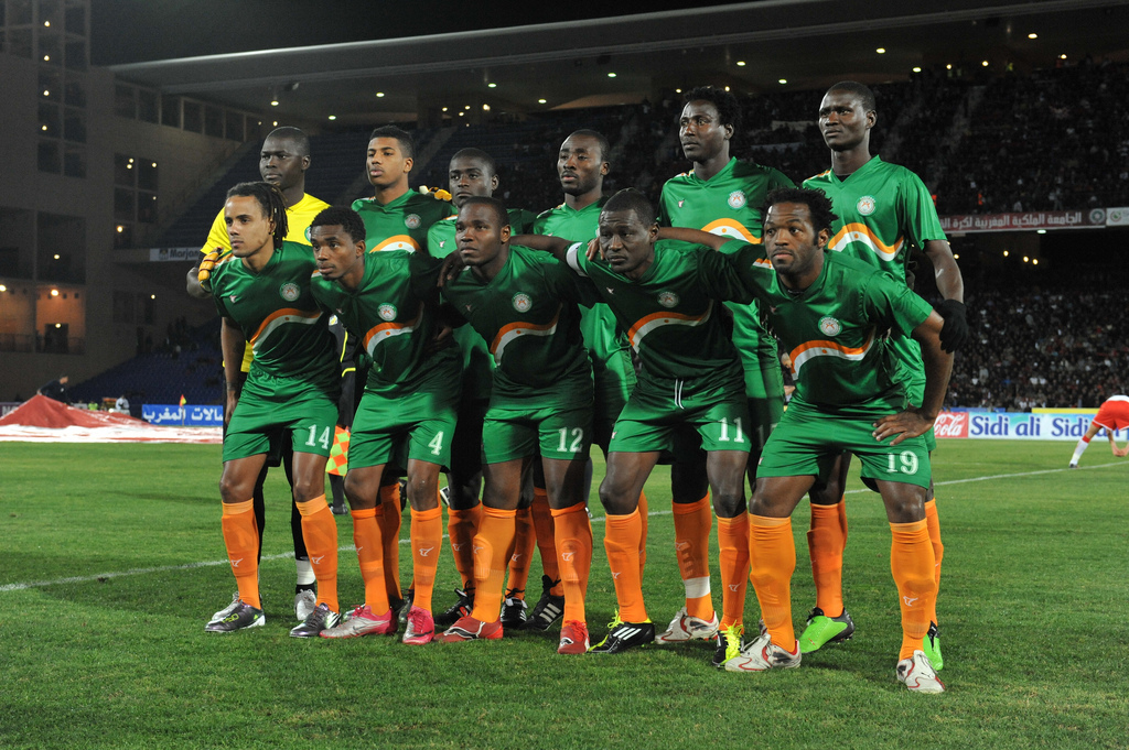 équipe du Niger en 2011